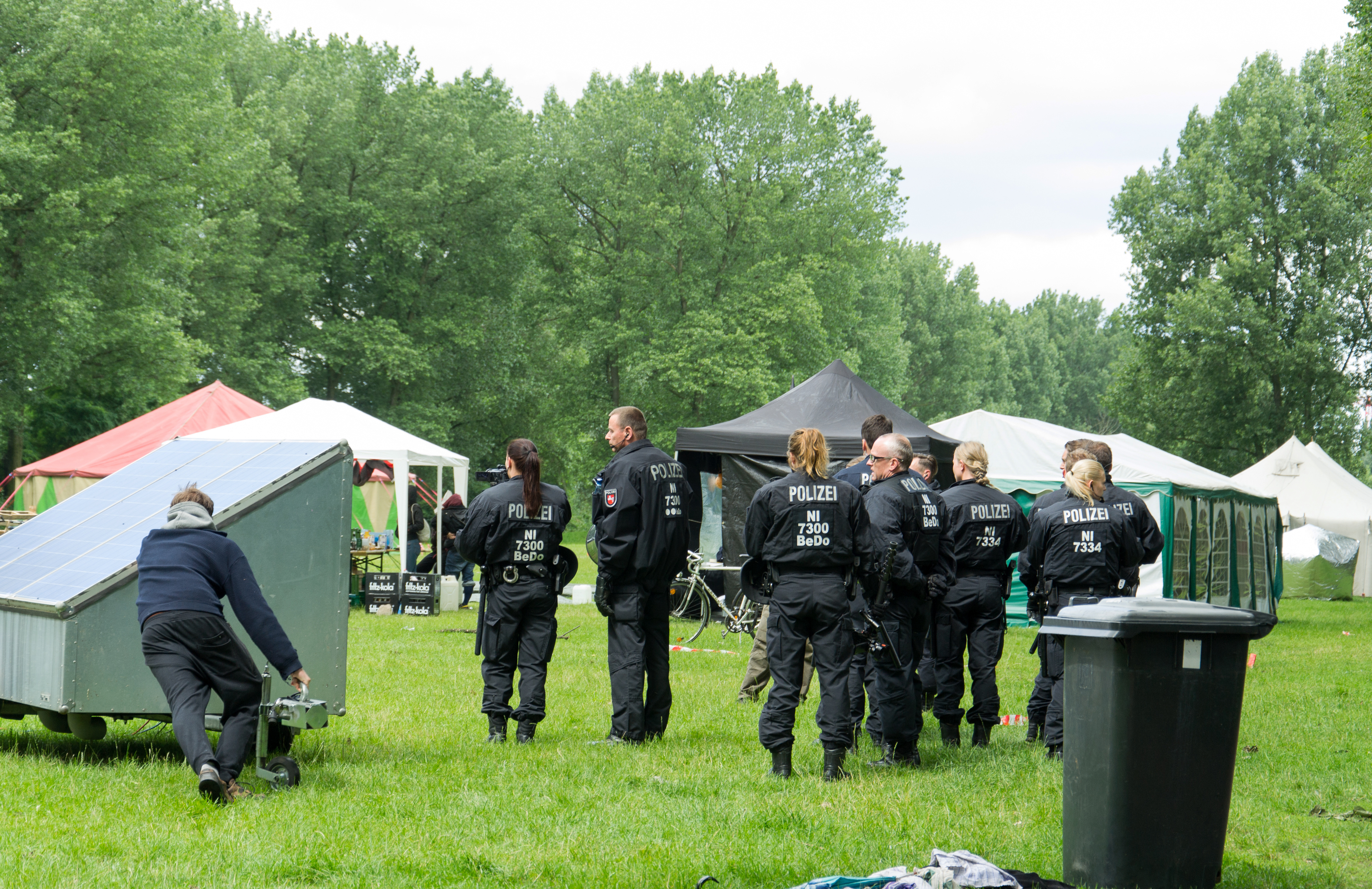 Die Polizei inspiziert das G-20 Protestcamp Elbpark Entenwerder nach der gewaltsamen Räumung vom 2. Juli 2017